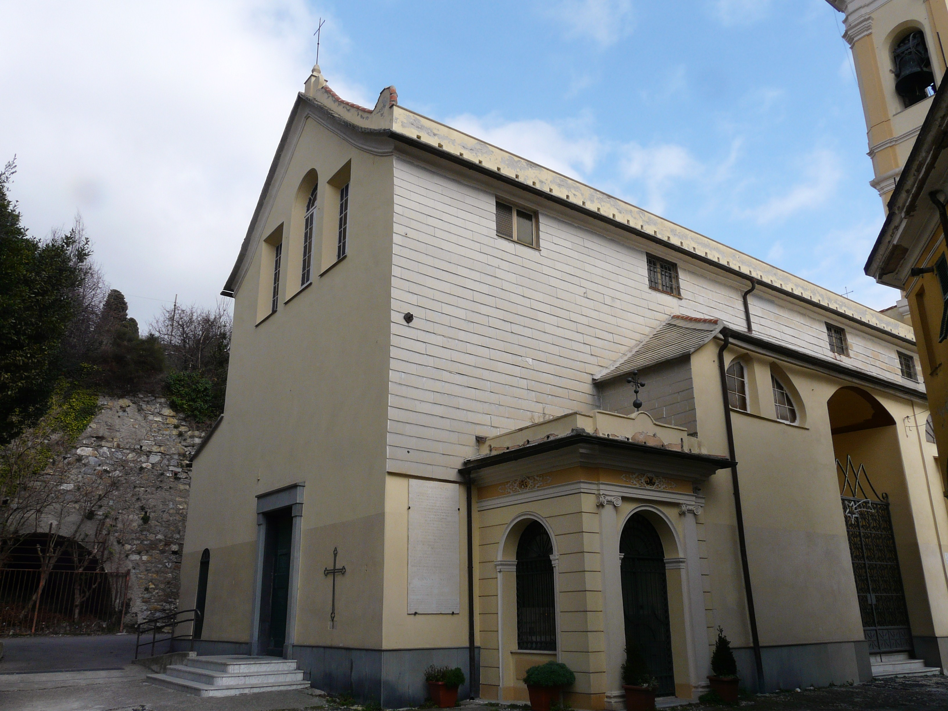 Chiesa di Santa Maria Assunta, Apparizione, Genova, Liguria, Italia